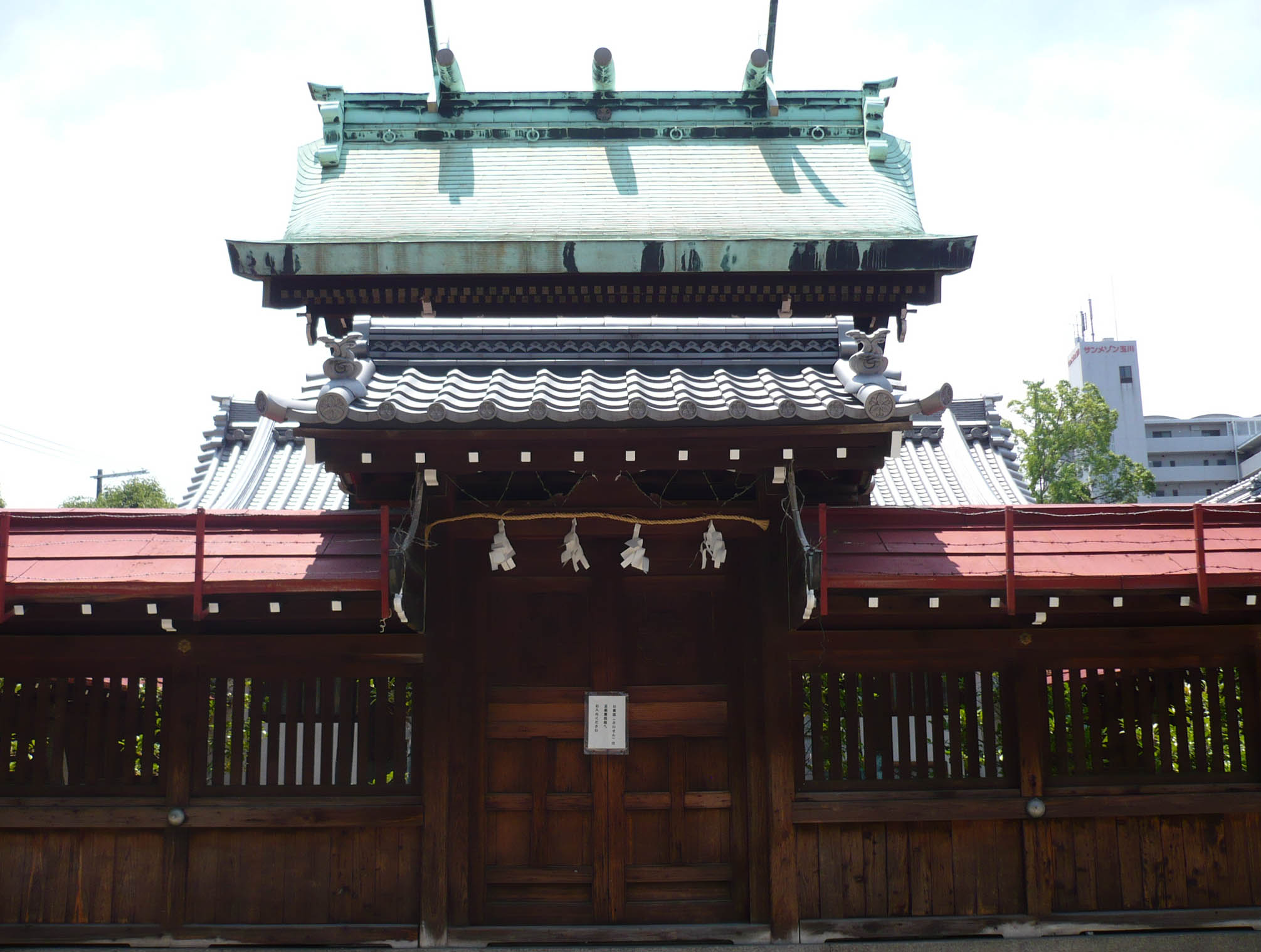 恵美須神社の本堂